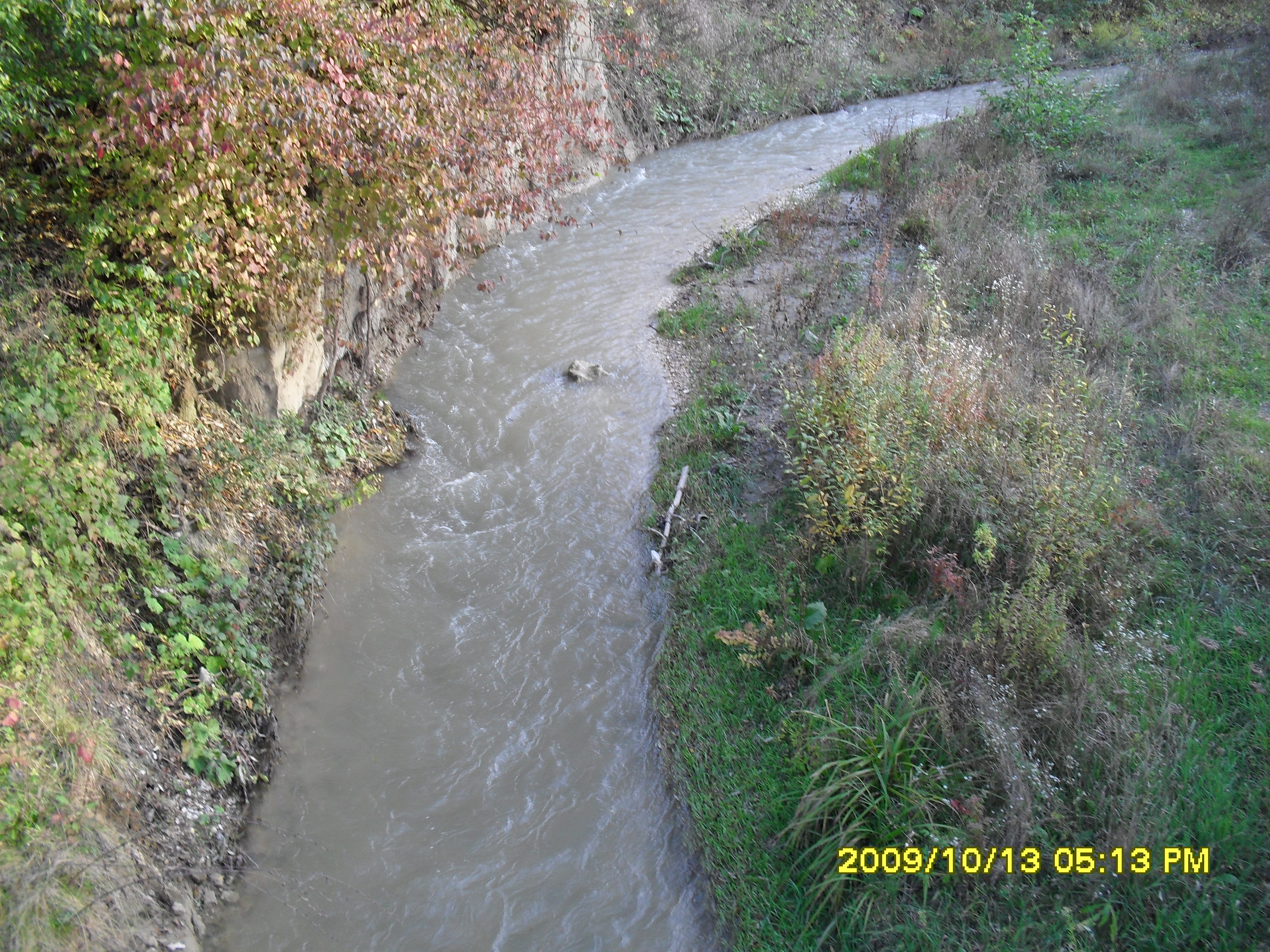 Река Юца